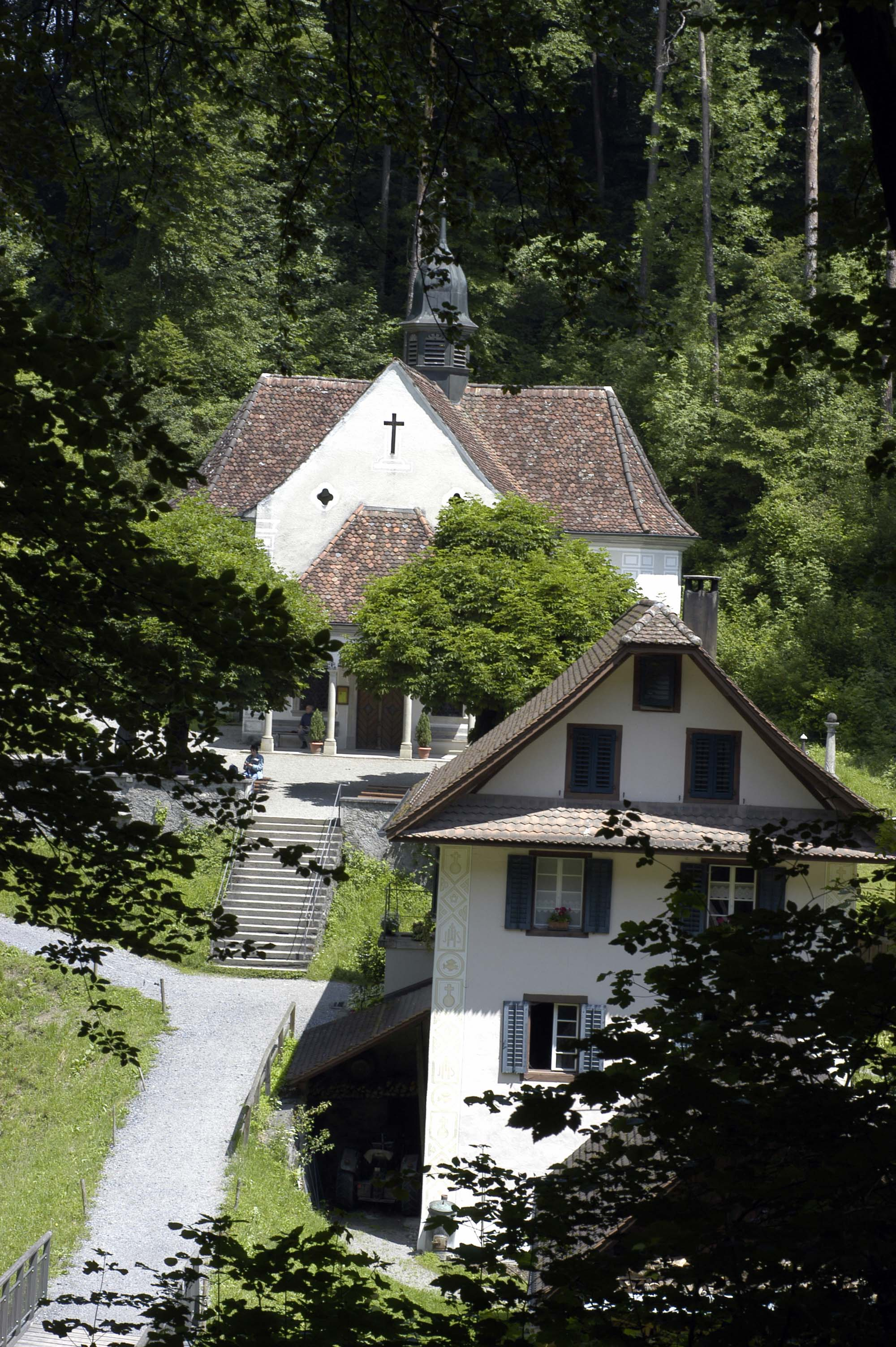 Kapelle Jonental, Gemeinde Jonen